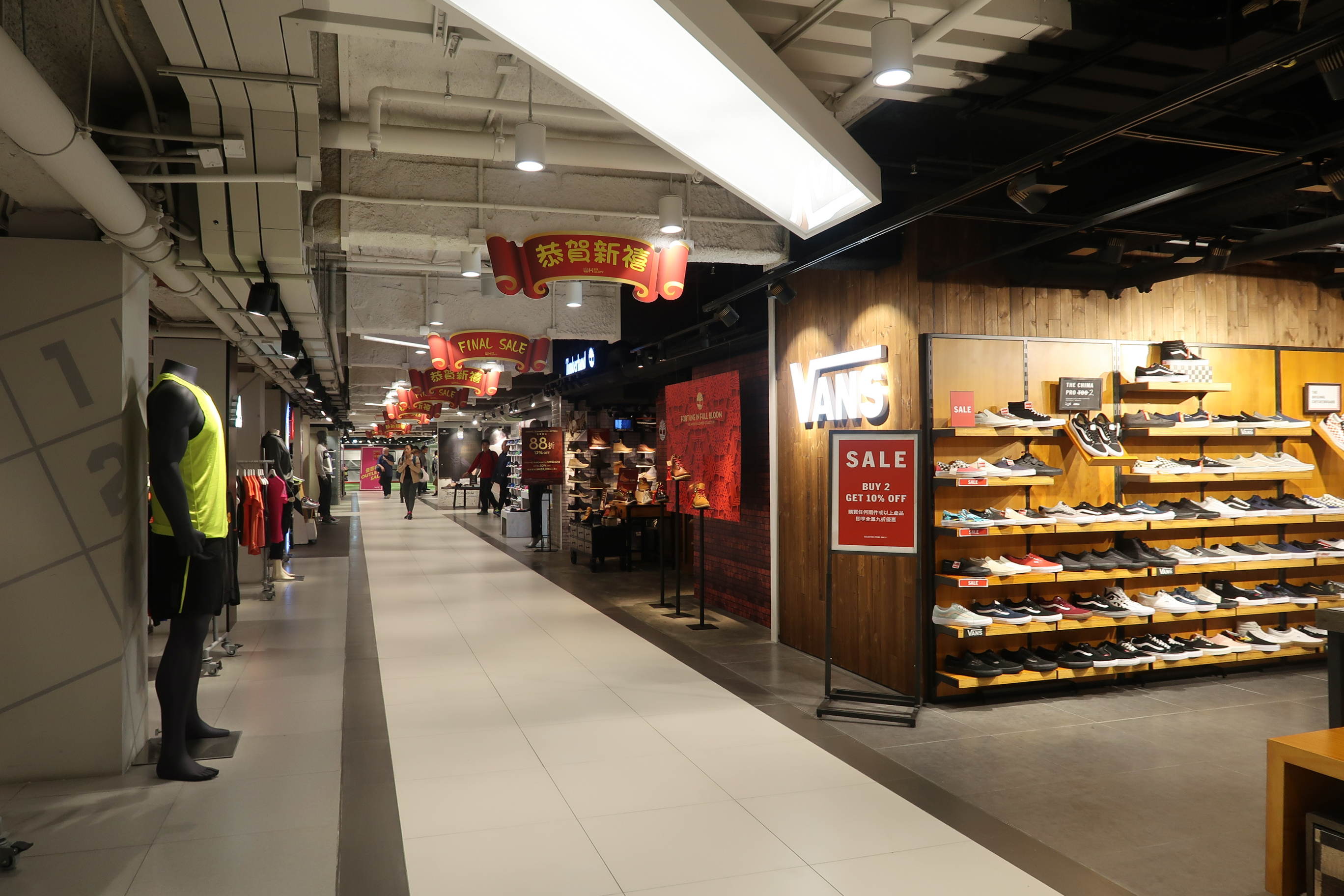 WK Square interior